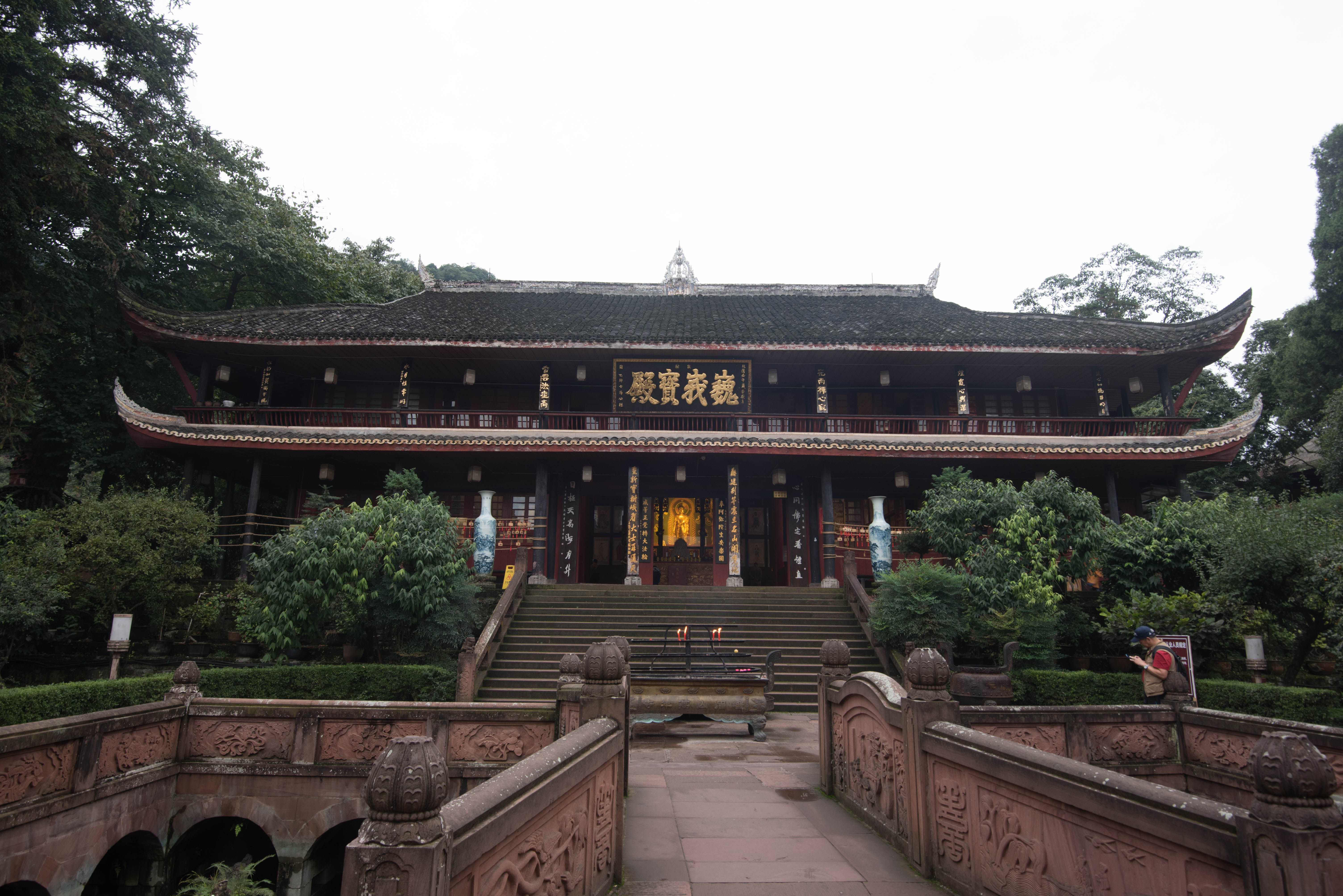 峨眉山万年寺